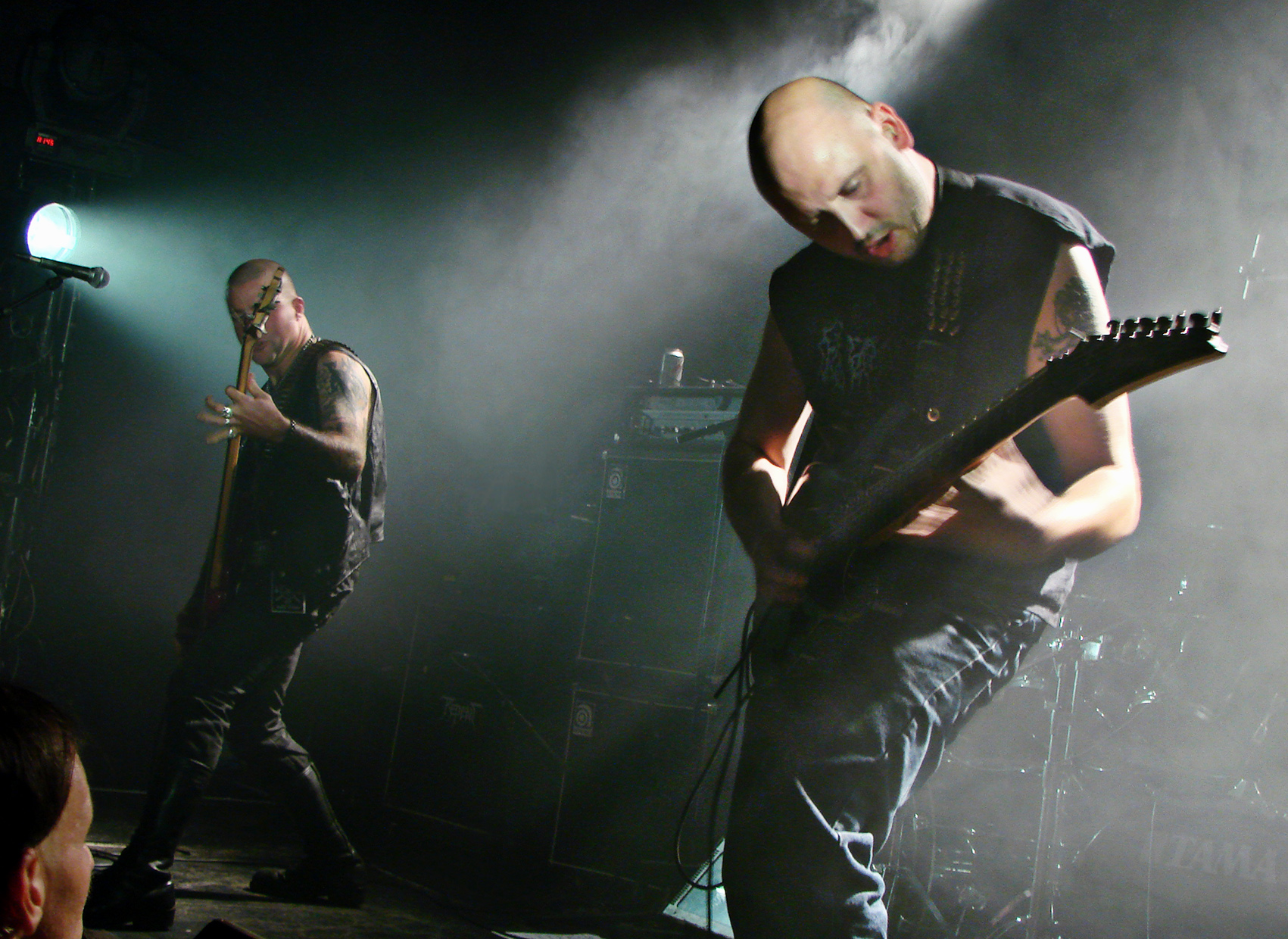 Angel Corpse, groupe de Death Metal américain, en concert au Nouveau Casino à Paris, le 28/04/08.